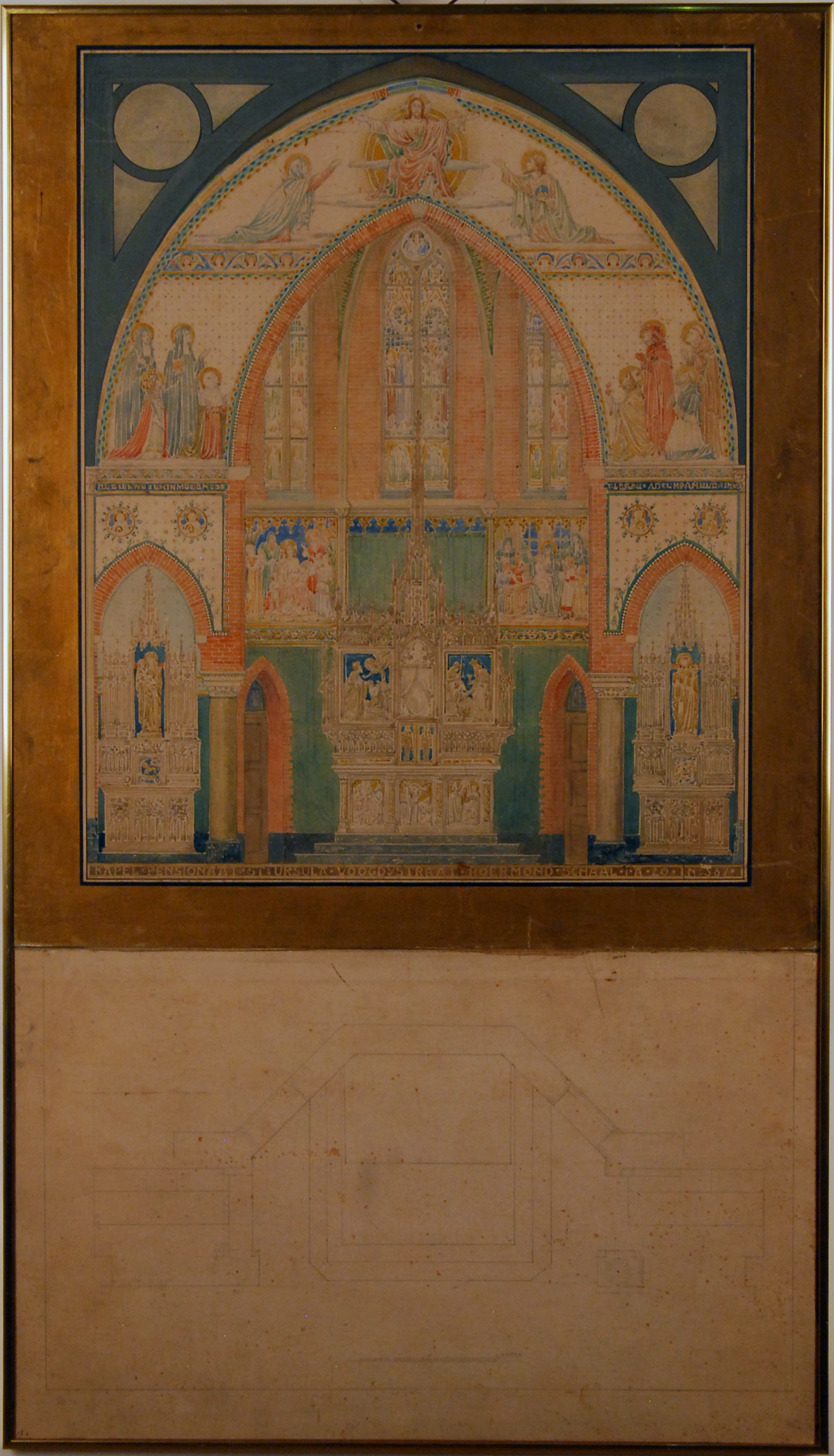 Ontwerp voor de Ursulakapel in Roermond. ca. 1905 (?). Potlood en verf op papier op karton (?). 107.5 × 61.8 × 2.3 cm (42.3 × 24.3 × 0.9 in). Roermond, Cuypershuis.